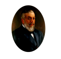 Retrat de Joaquim Basora